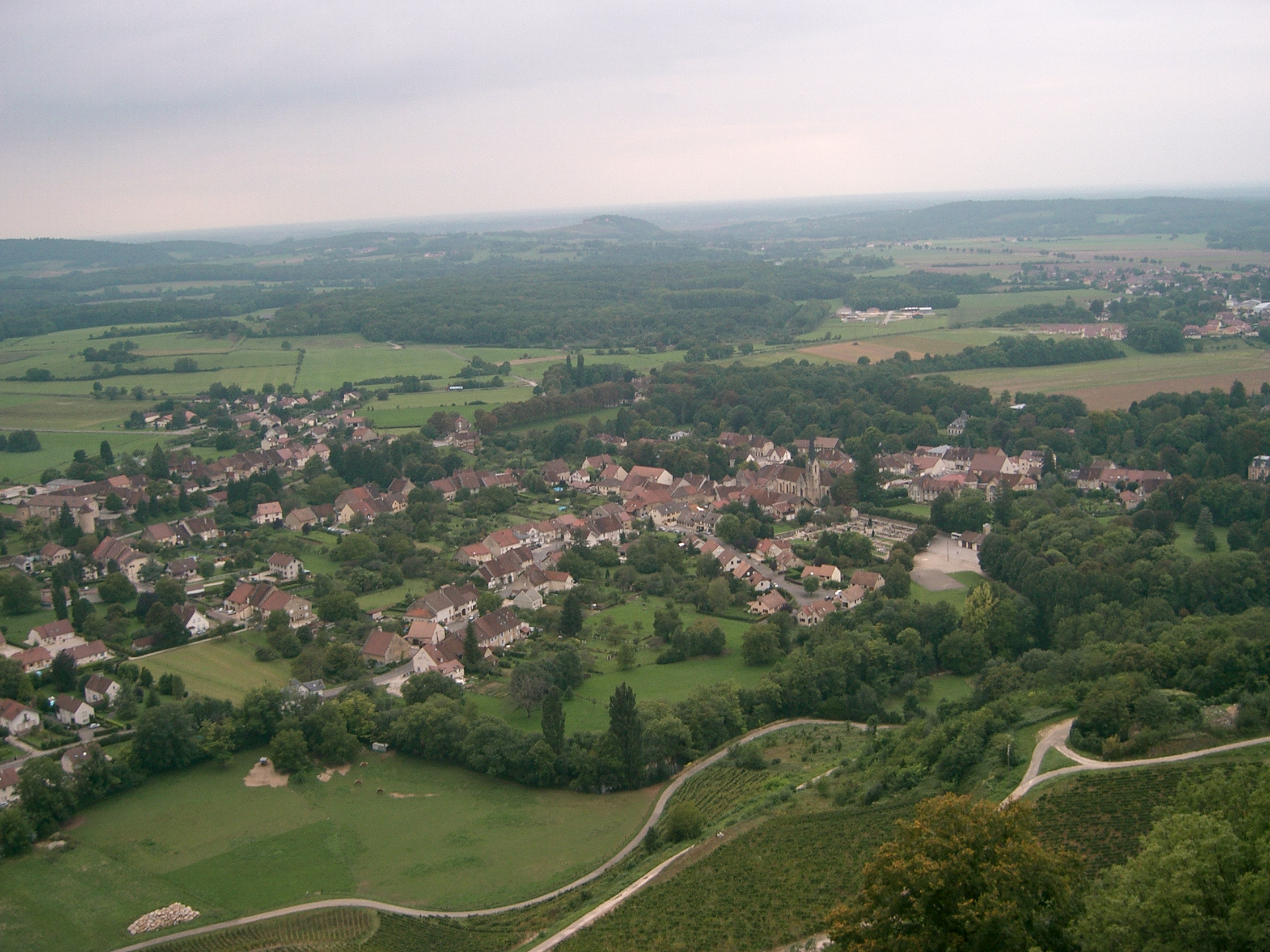 Voiteur depuis Château-Chalon - Jura (39) France